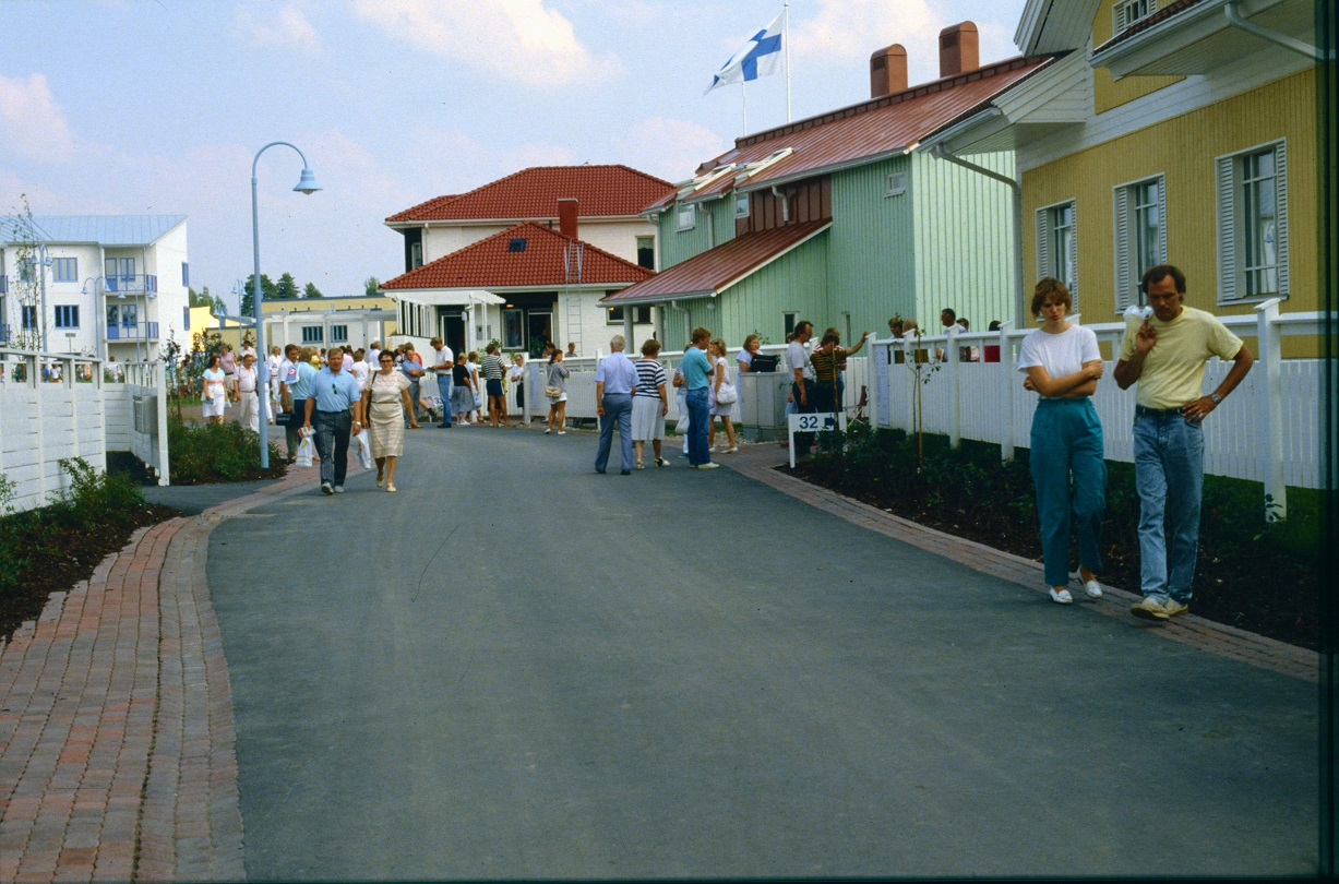 Turun asuntomessut 1988